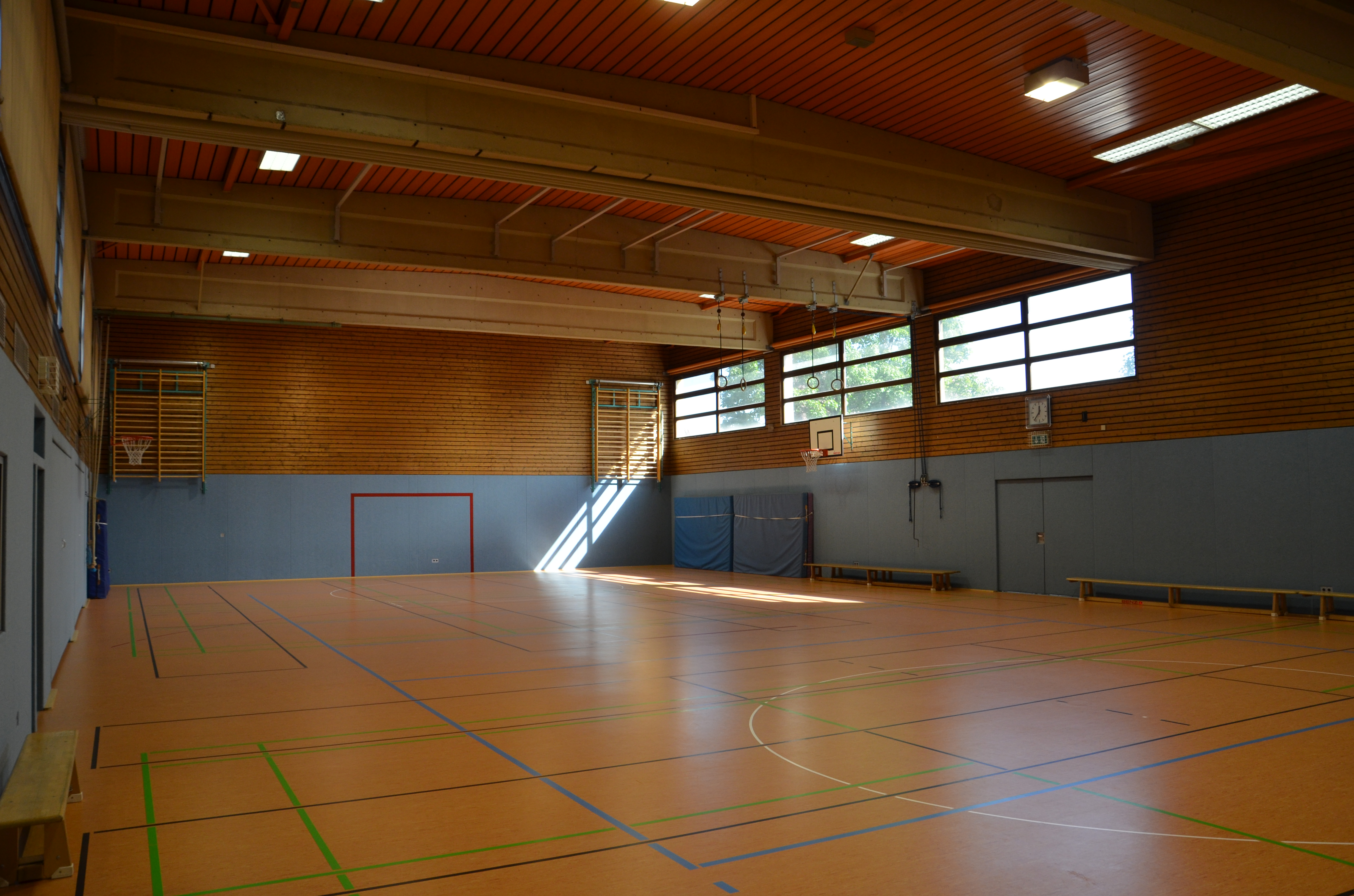 Wasenhof